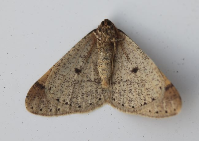 Graugelber Breitflügelspanner (Agriopis marginaria) Unterseite